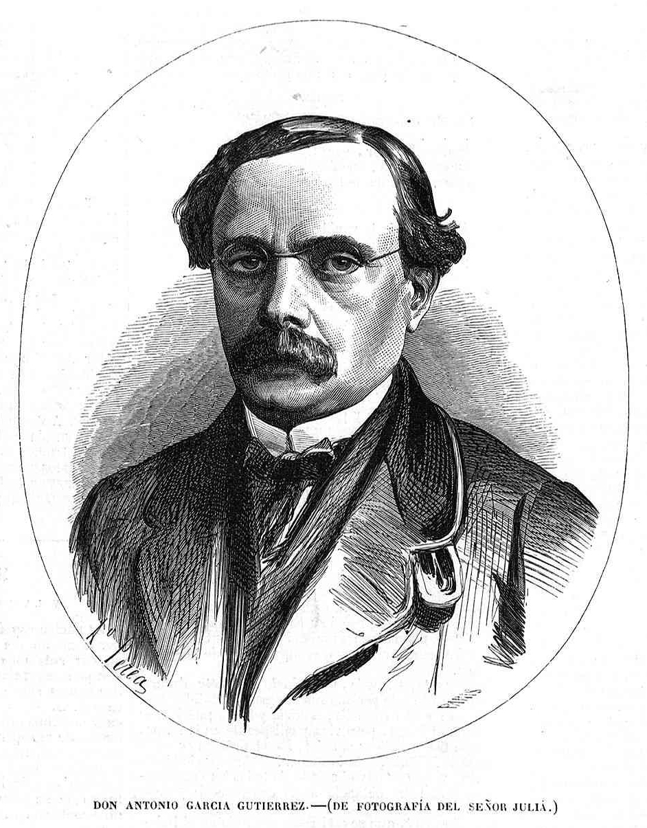 «Don Antonio García Gutiérrez, de fotografía del señor Juliá», en la revista española El Museo Universal.